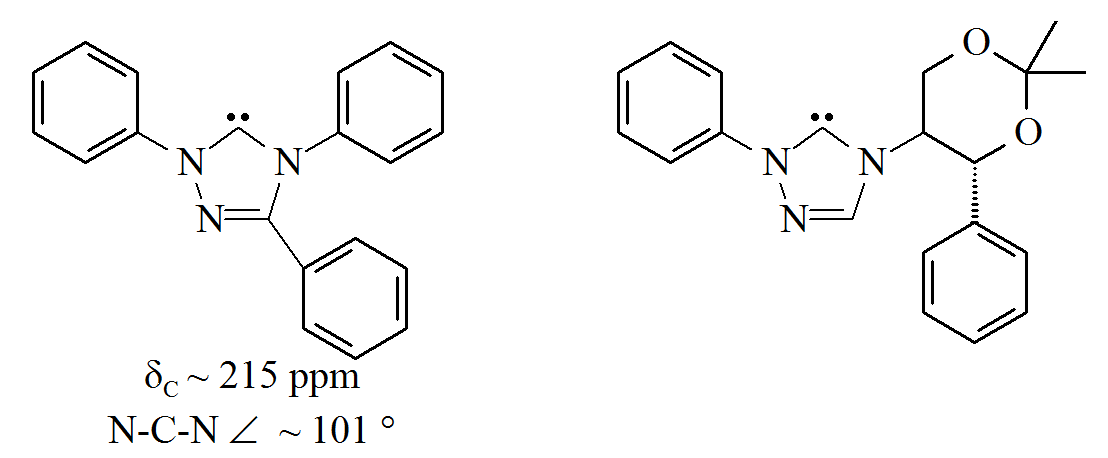 Triazol5ylidenes